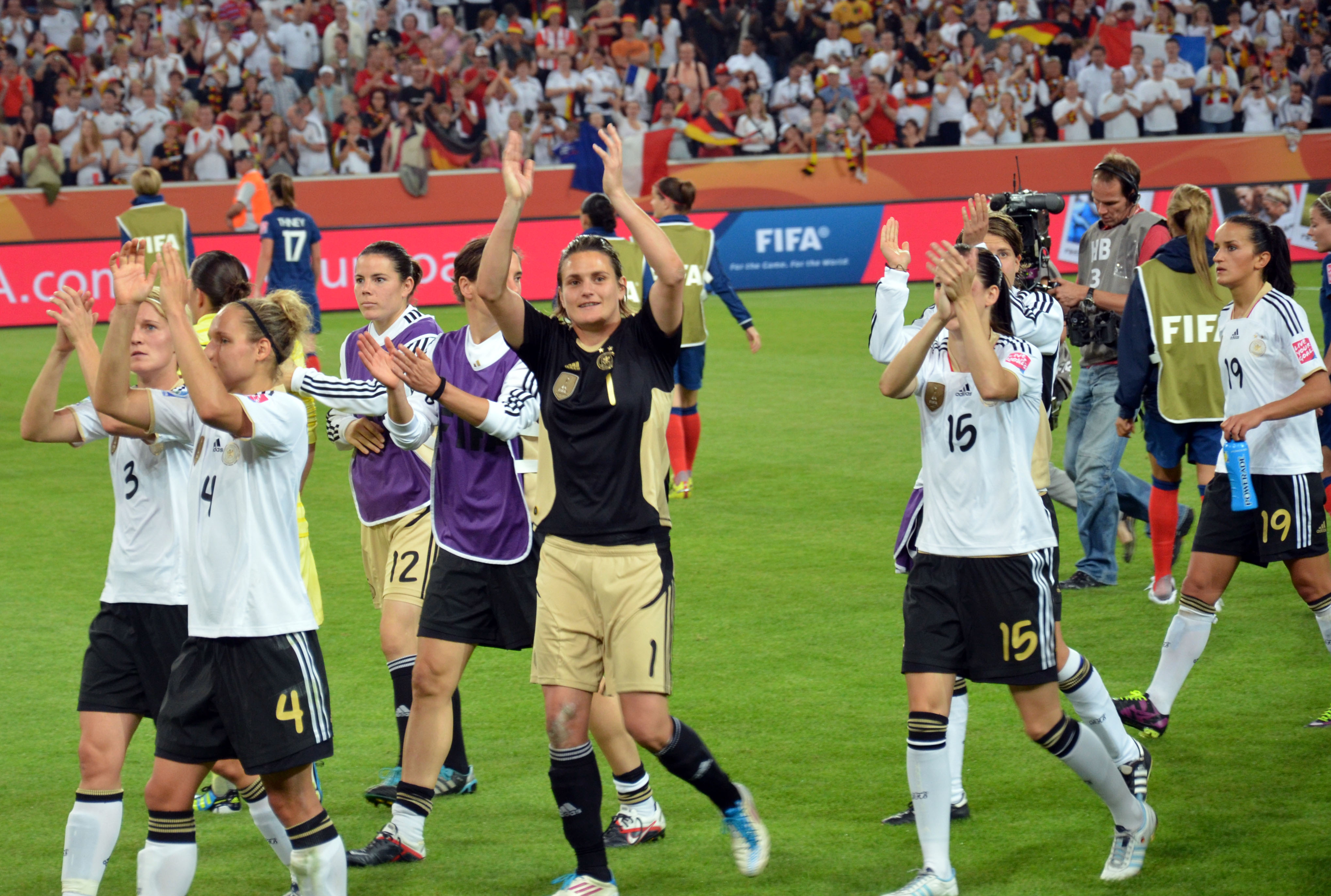 WM Vorrundenspiel zwischen Frankreich und Deutschland am 5. Juli 2011 im Borussiapark in Mönchengladbach